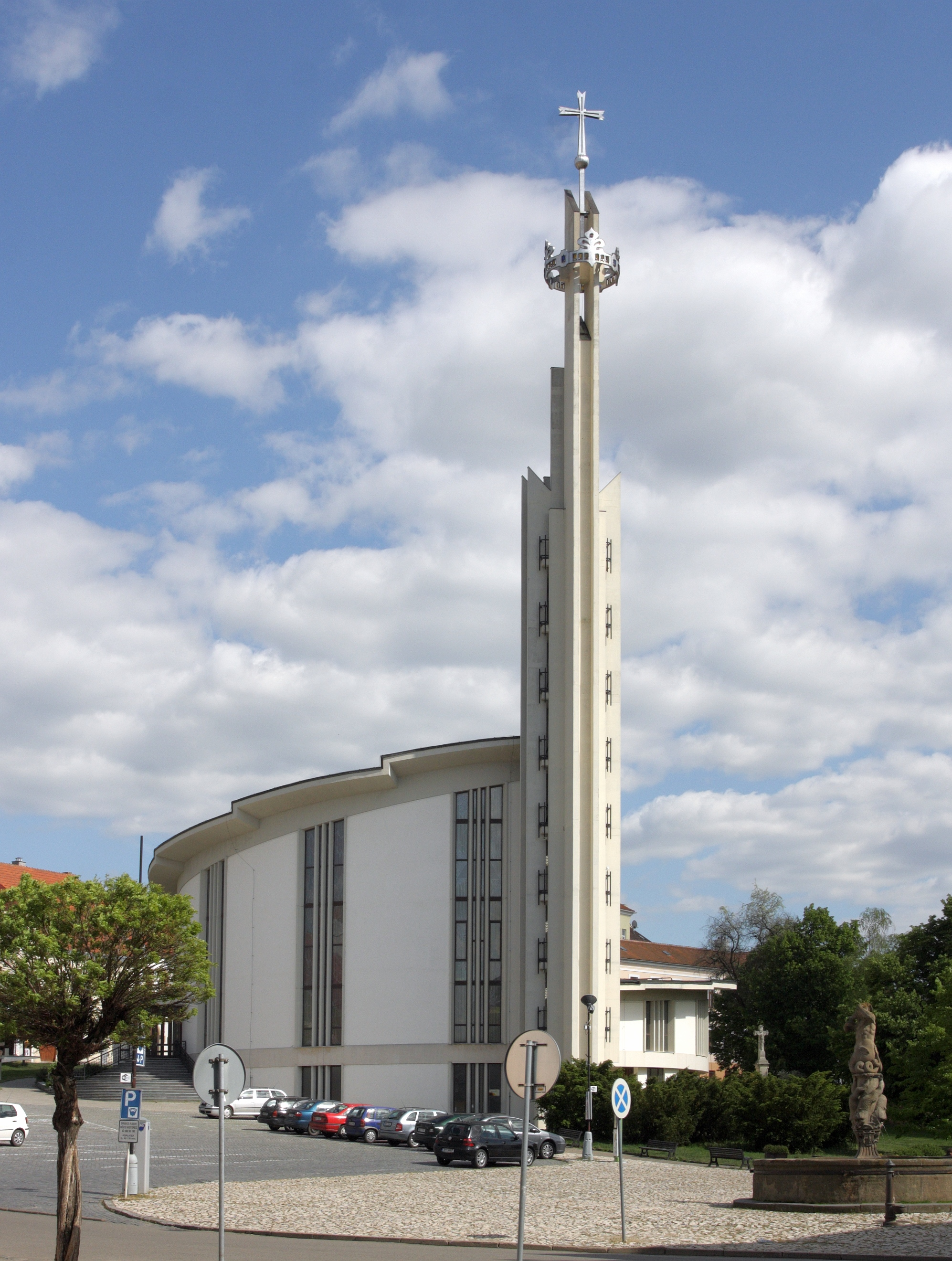 Hustopeče - kostel sv Václava.